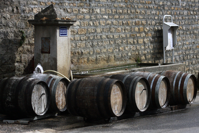 Fontaine et fûts au coeur du village